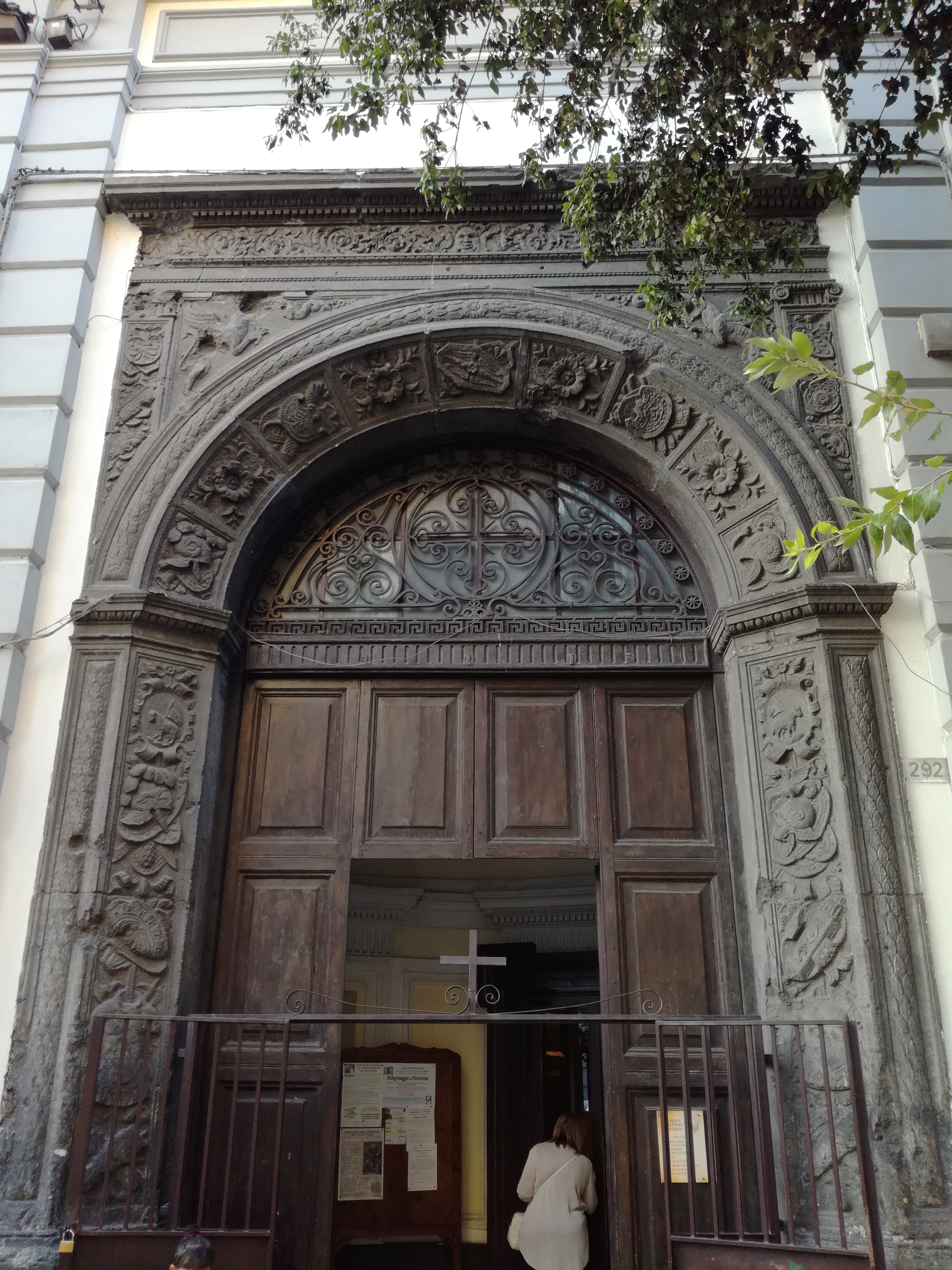 Portale Pietro ad Aram